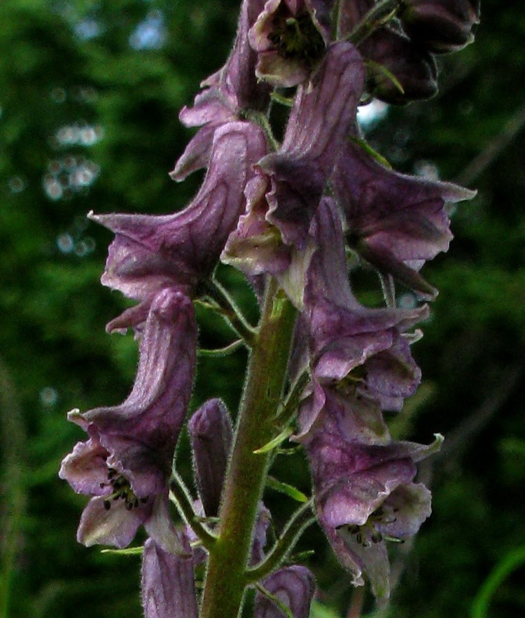 Цветки борца буйбинского (Aconitum × bujbense). Западный Саян, природный парк "Ергаки".